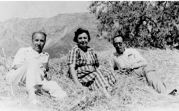 Germán Bernácer con su mujer Maria Guardiola Costa y Oscar Esplà en la Sierra de Aitana.